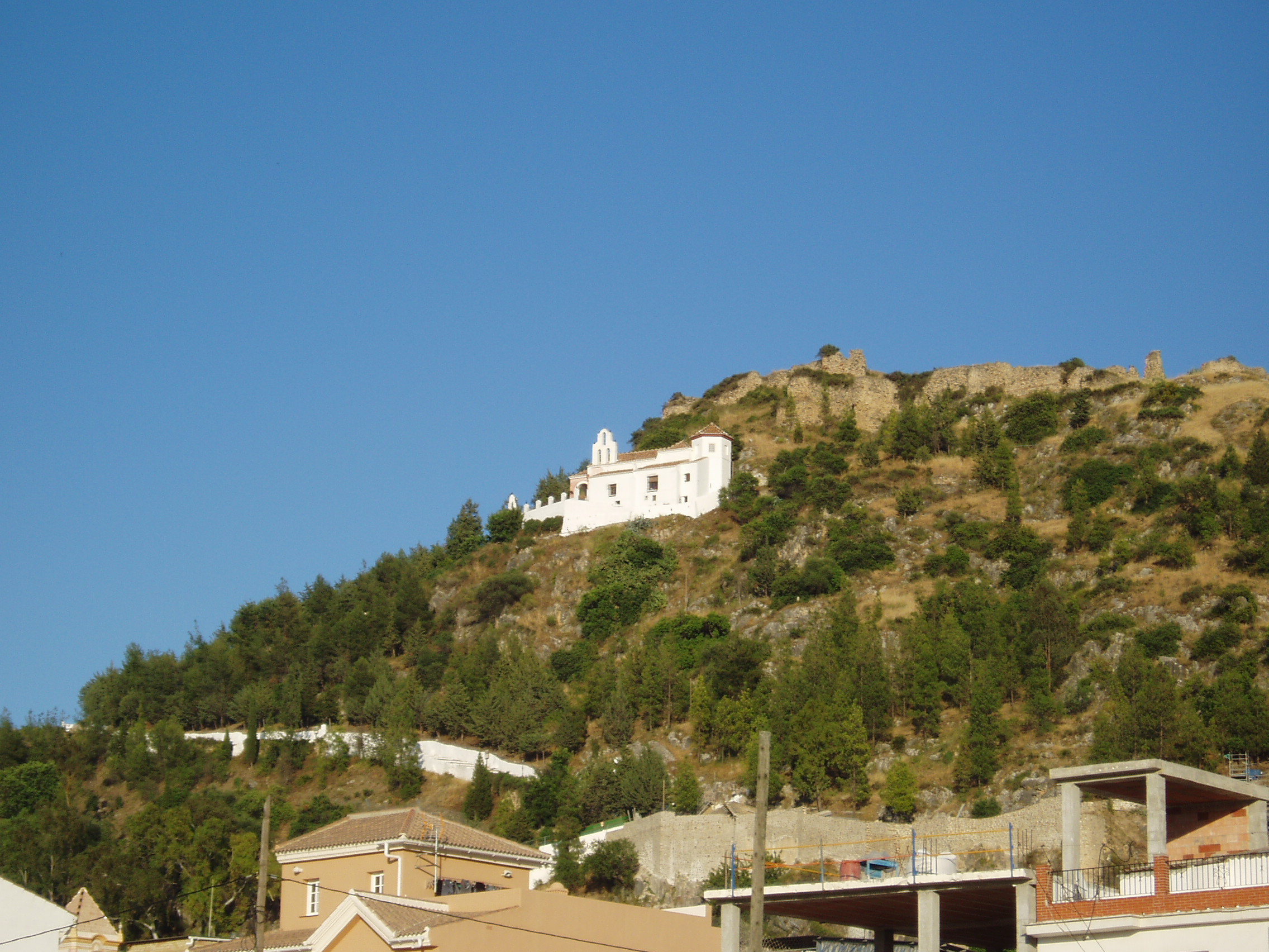 Ermita en Cártama, provincia de Málaga.